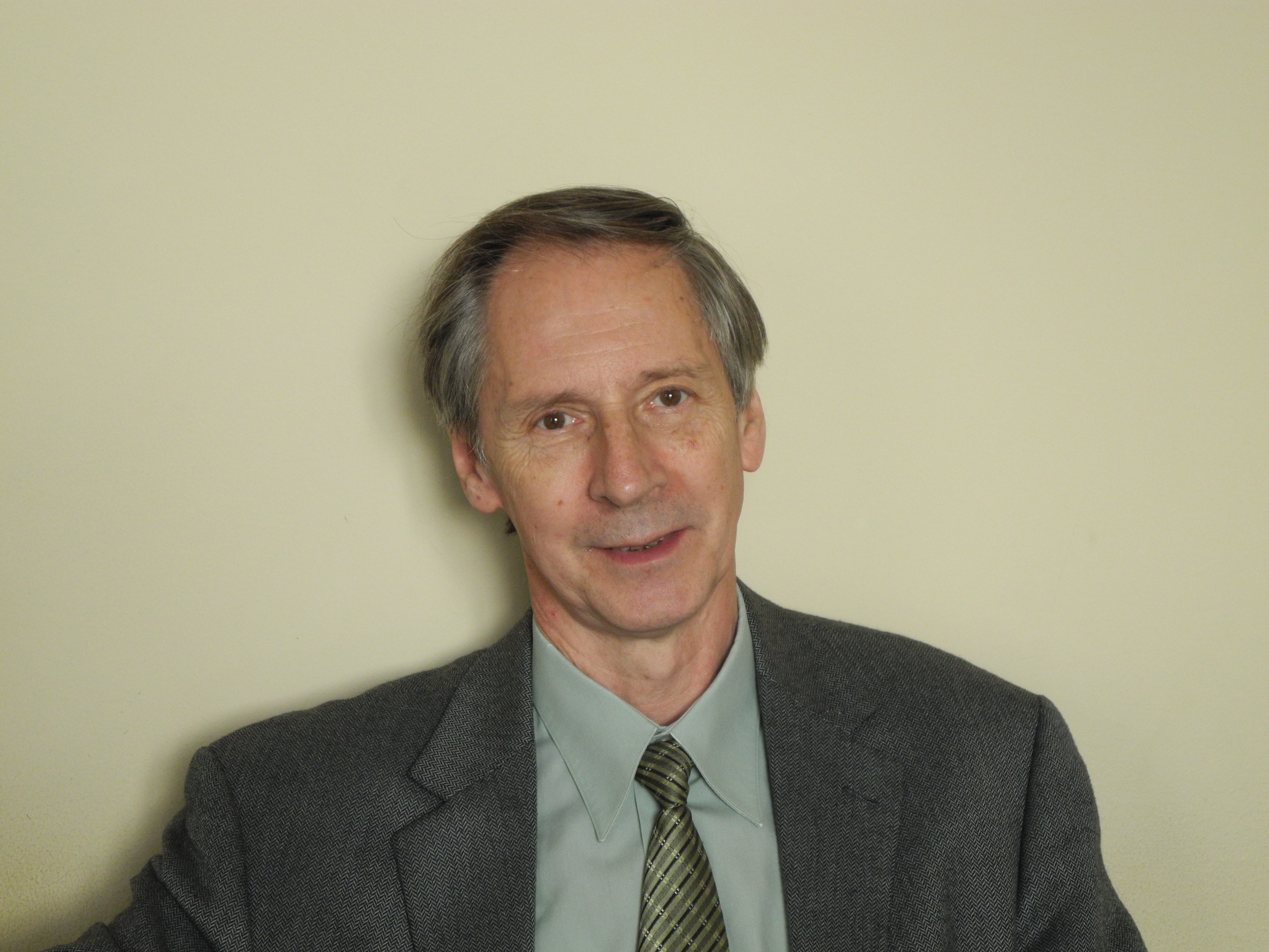 Виталий Борисович Волошинов - советский и российский физик, специалист по акустооптике